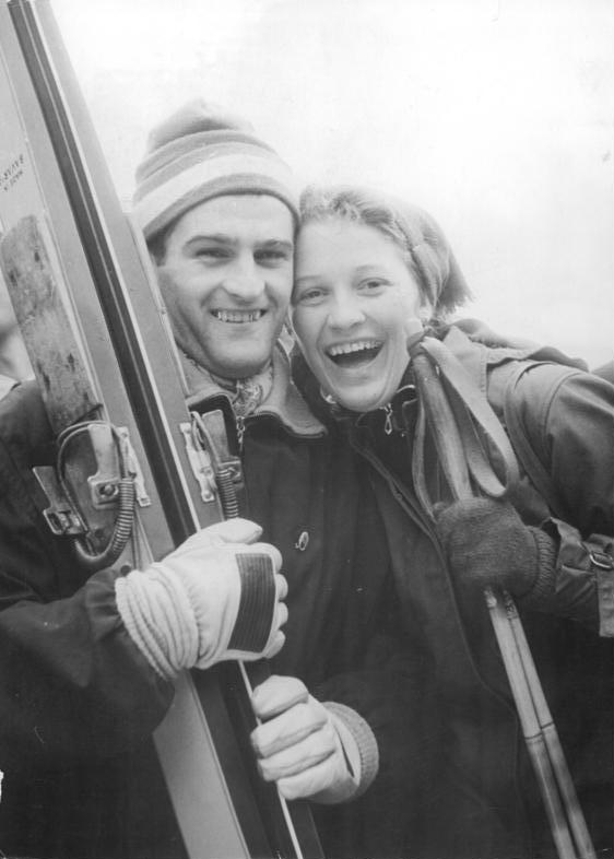 Zentralbild Löwe 24.2.1958 Deutsche Skimeisterschaften in Altenberg beendet In Altenberg wurden am Sonntag, dem 23.2.1956, die Nordischen Deutschen Skimeisterschaften mit dem Spezialsprunglauf beendet. Deutscher Meister im Springen wurde Harry Glass (Dynamo Klingenthal) vor Helmut Recknagel (Motor Zella-Mehlis) und Titelverteidiger Werner Lesser (Dynamo Brotterode). UBz: Der Deutsche Vizemeister Helmut Recknagel nach dem Springen.